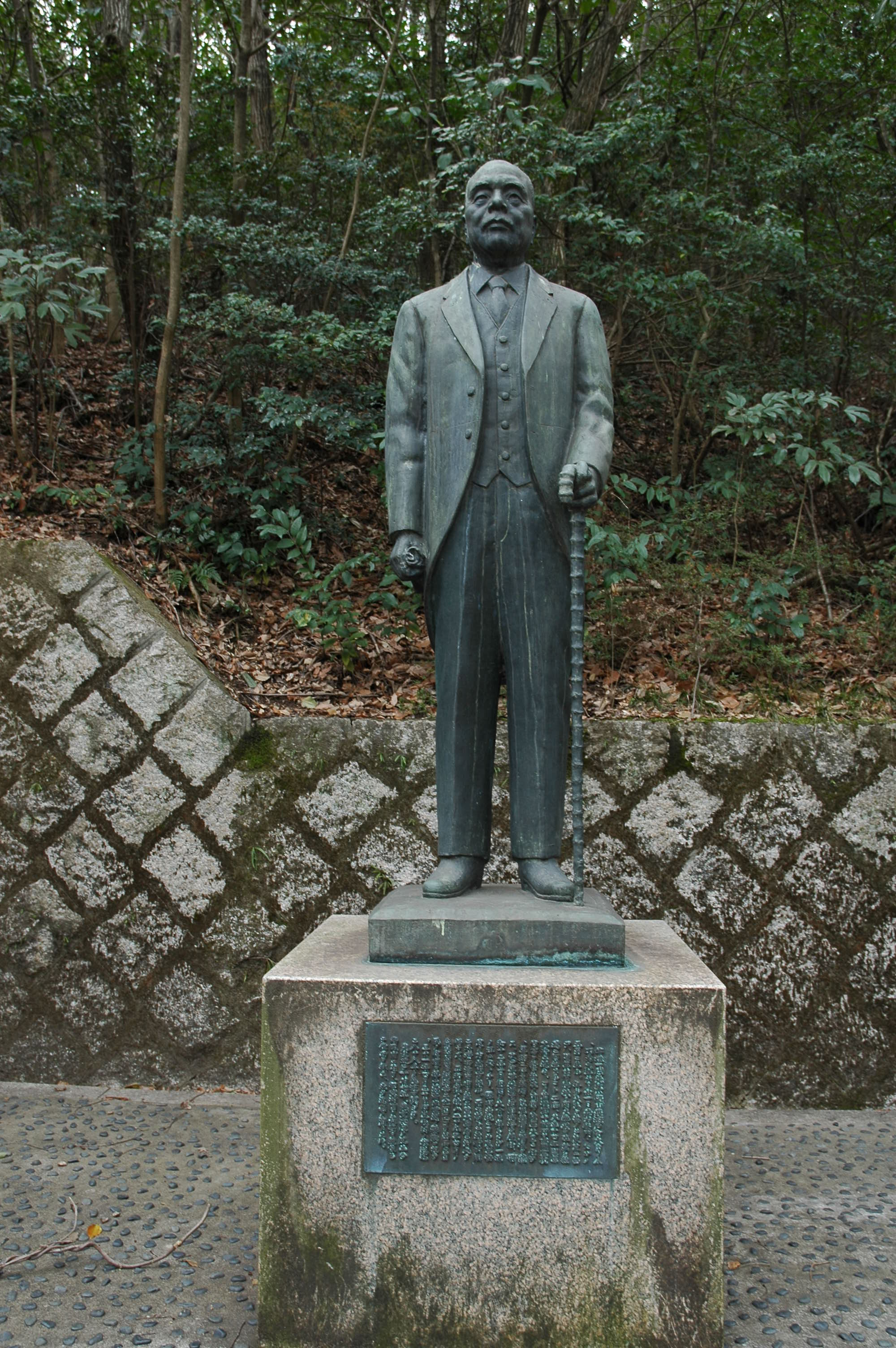 statue of Ugaki Kazushige in Okayamaken gokoku shrine.